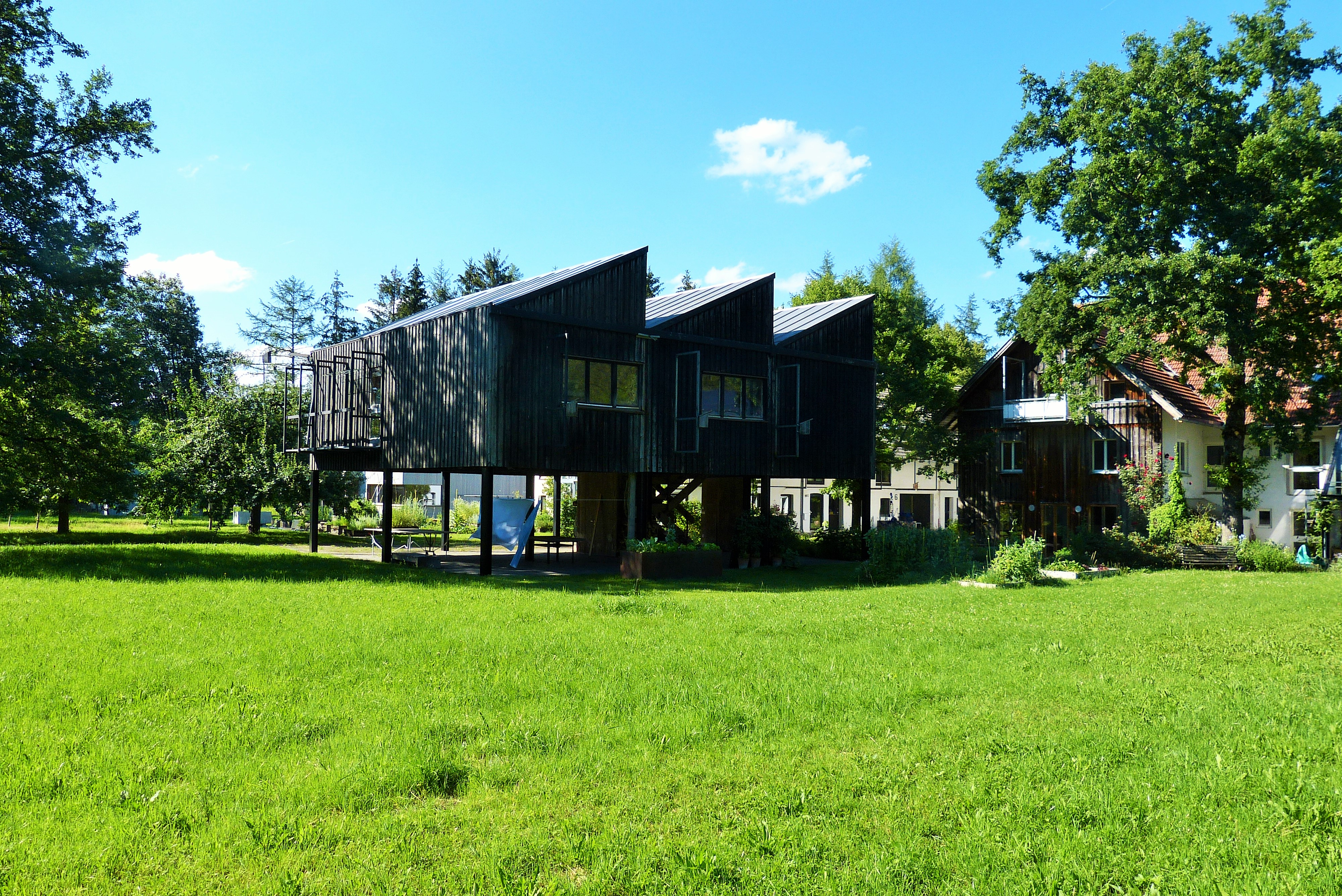 Ehem. Rotis Institut für analoge Studien (1984-1992); 2020